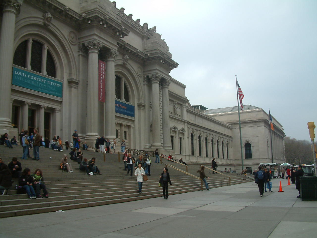 Museo Metropolitano de Arte de Nueva York